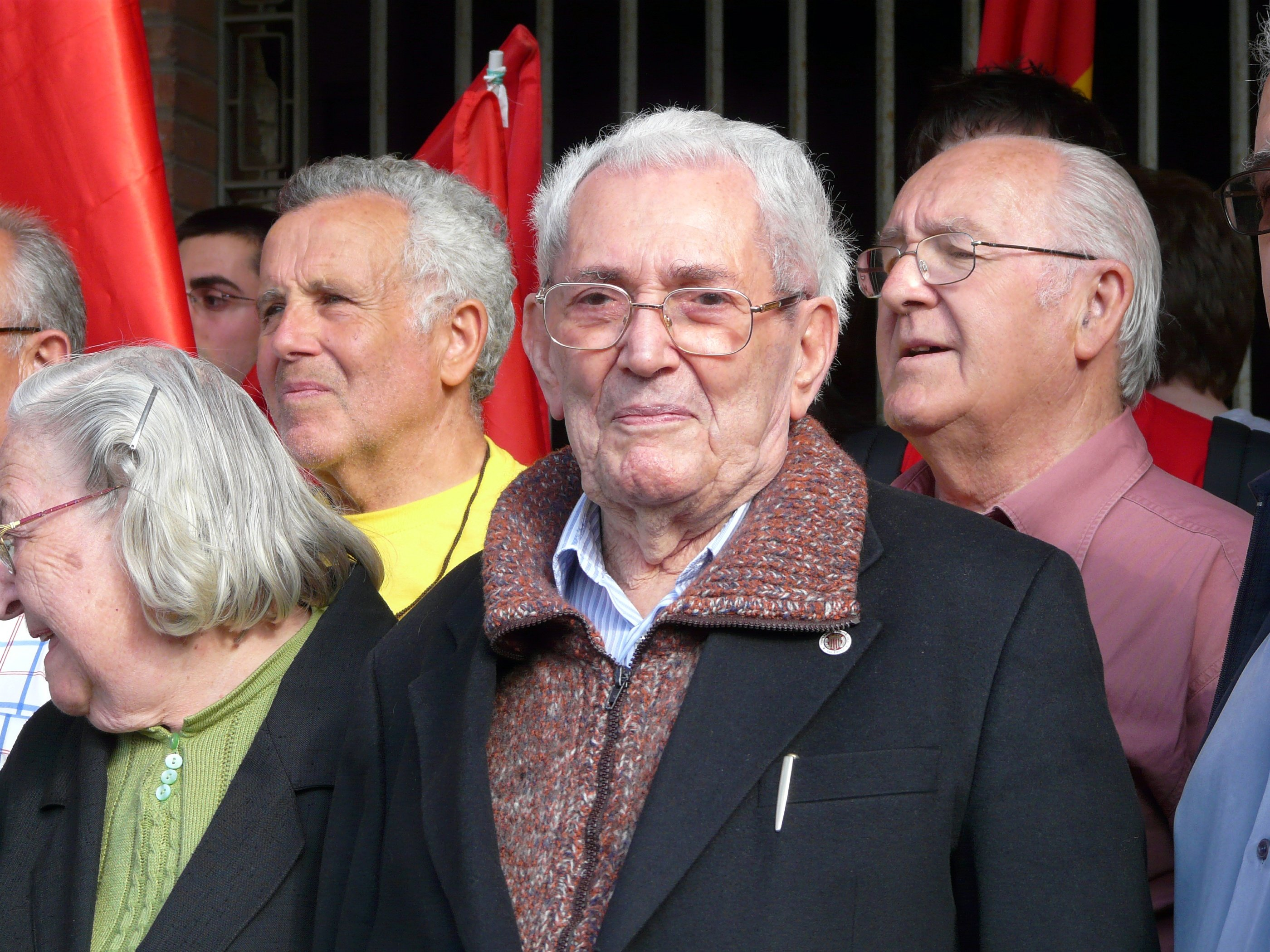 Marcelino Camacho en el acto en el que se descubrió una placa en la cárcel de Carabanchel en recuerdo a los presos políticos. Todos los datos aquí.